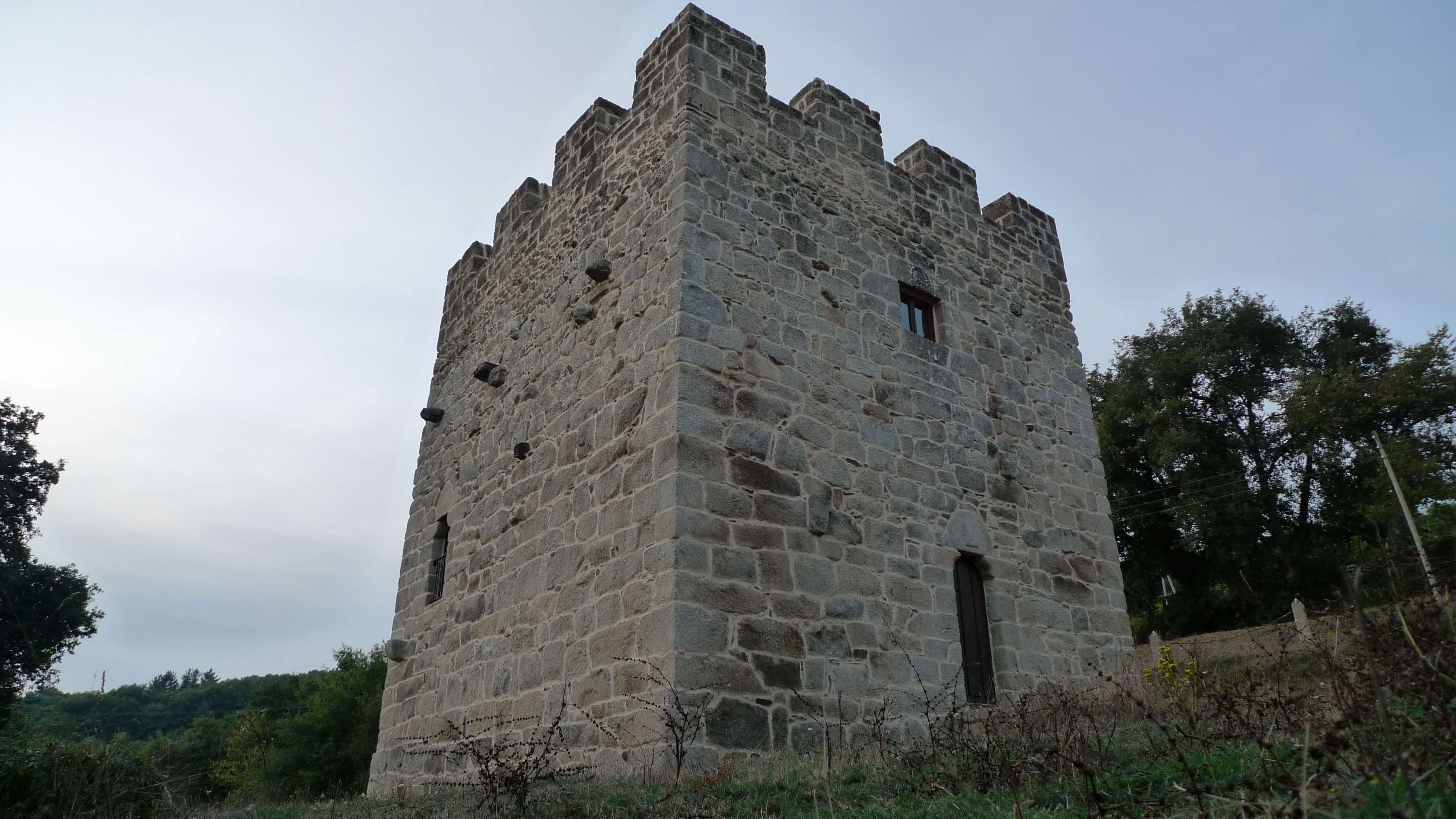 Torre da Candaira - O Saviñao (Lugo)